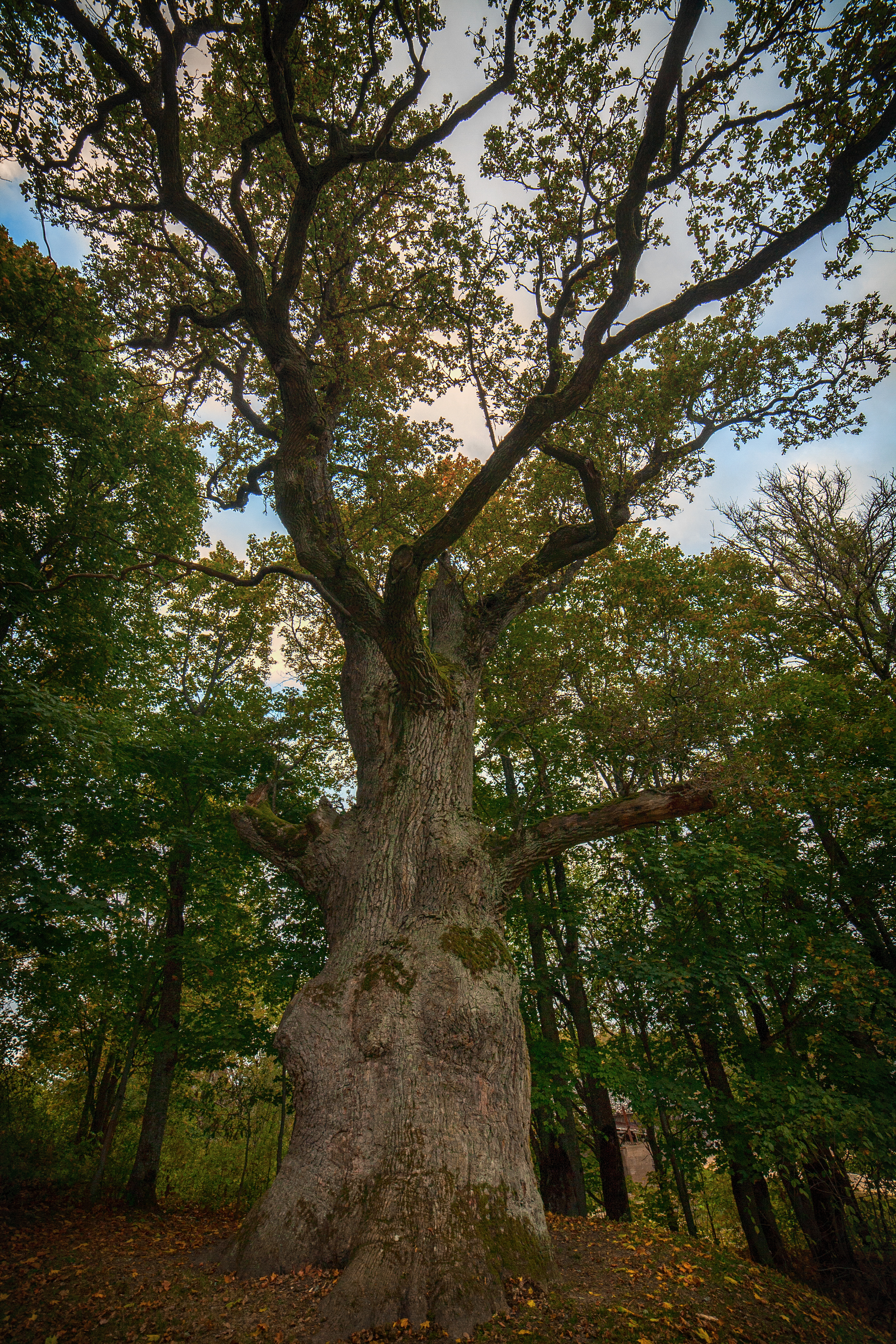 Sējas Dižozols